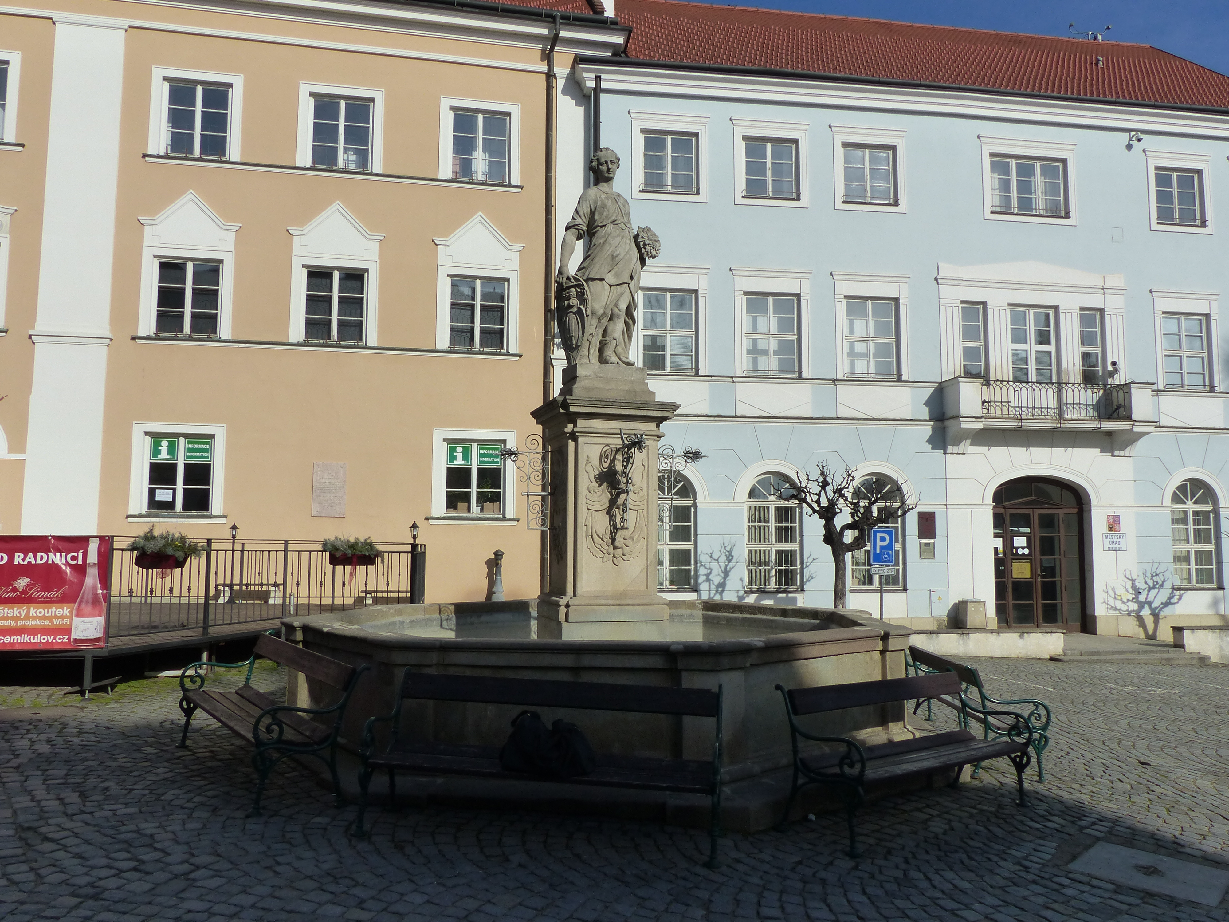 Pomonabrunnen vor dem Rathaus in Mikulov